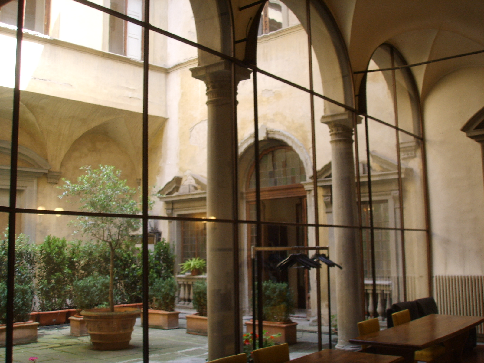 Palazzo di valfonda, cortile